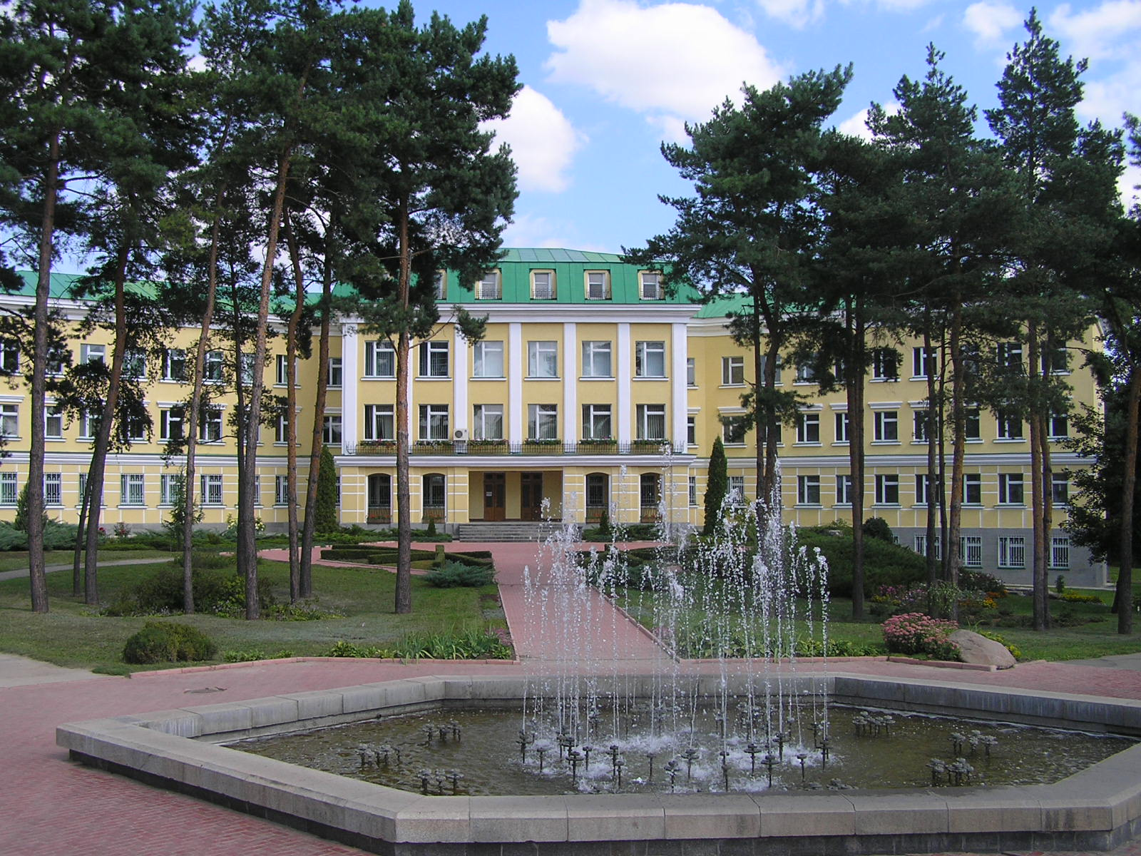 Парк «Софіївка» з комплексом водойм, паркових будівель, споруд і скульптур, Умань, Садова вул., 55